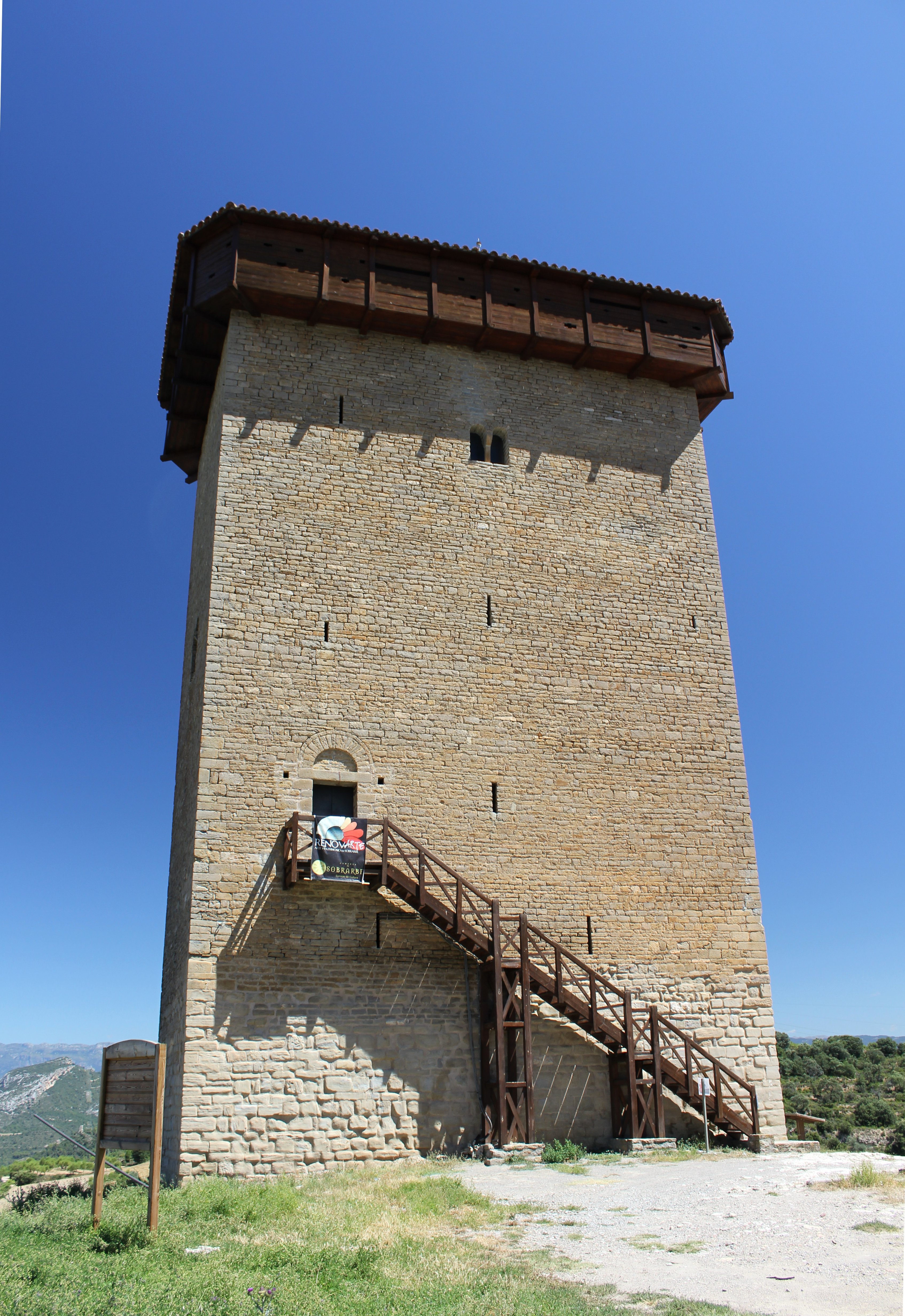 Aragonés: l'Abizanda